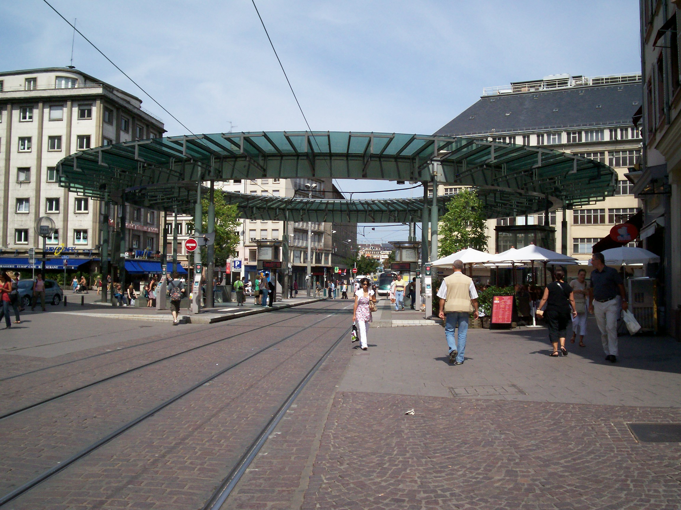 Station Lignes A et D Homme de Fer